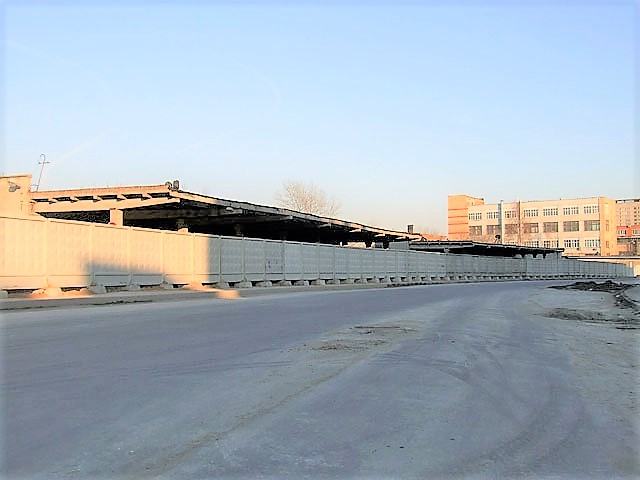 Бывшая станция "Октябрьские казармы"